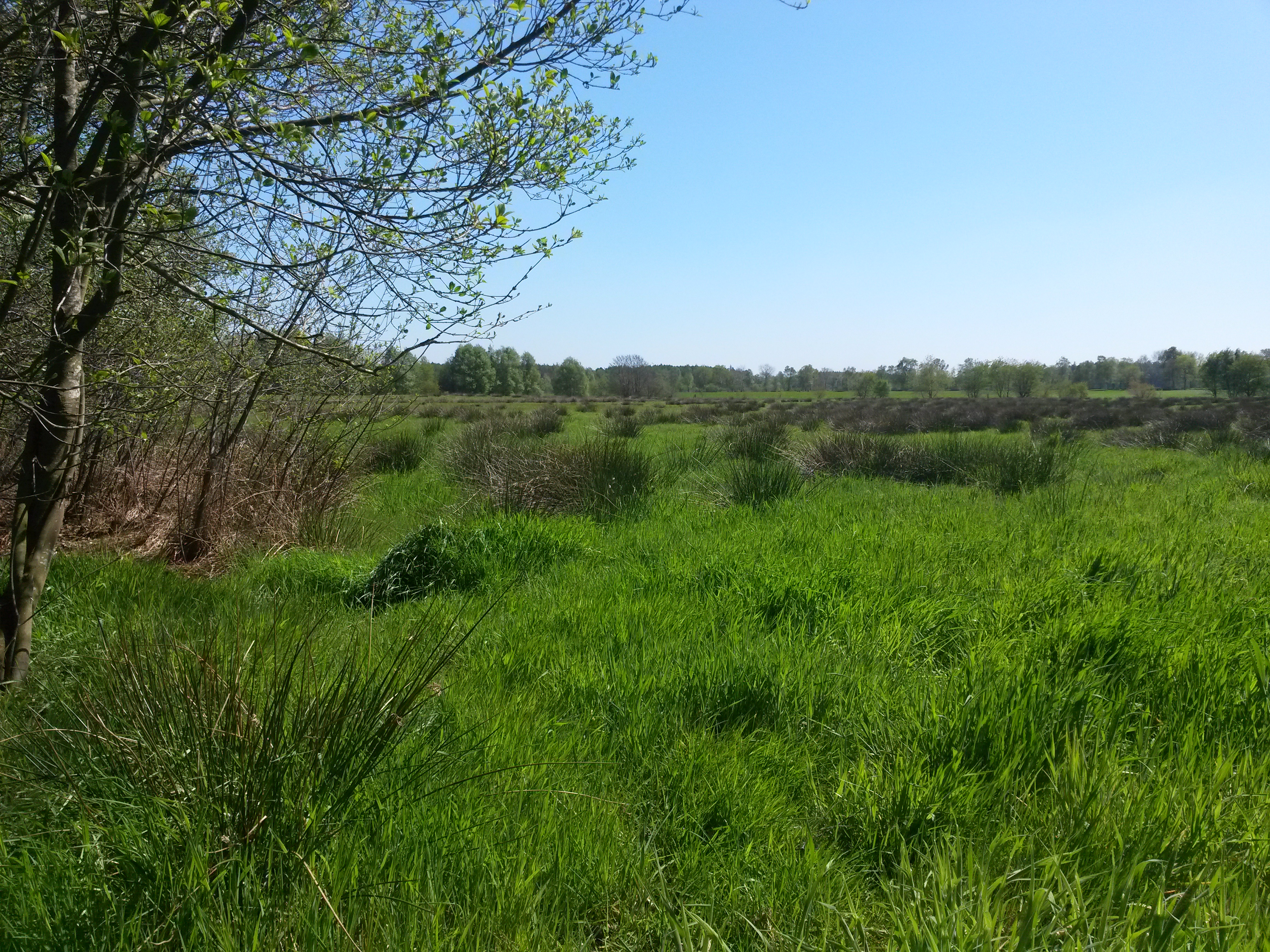 Naturschutzgebiet Bockholter Dose (NSG WE 138) im Frühling